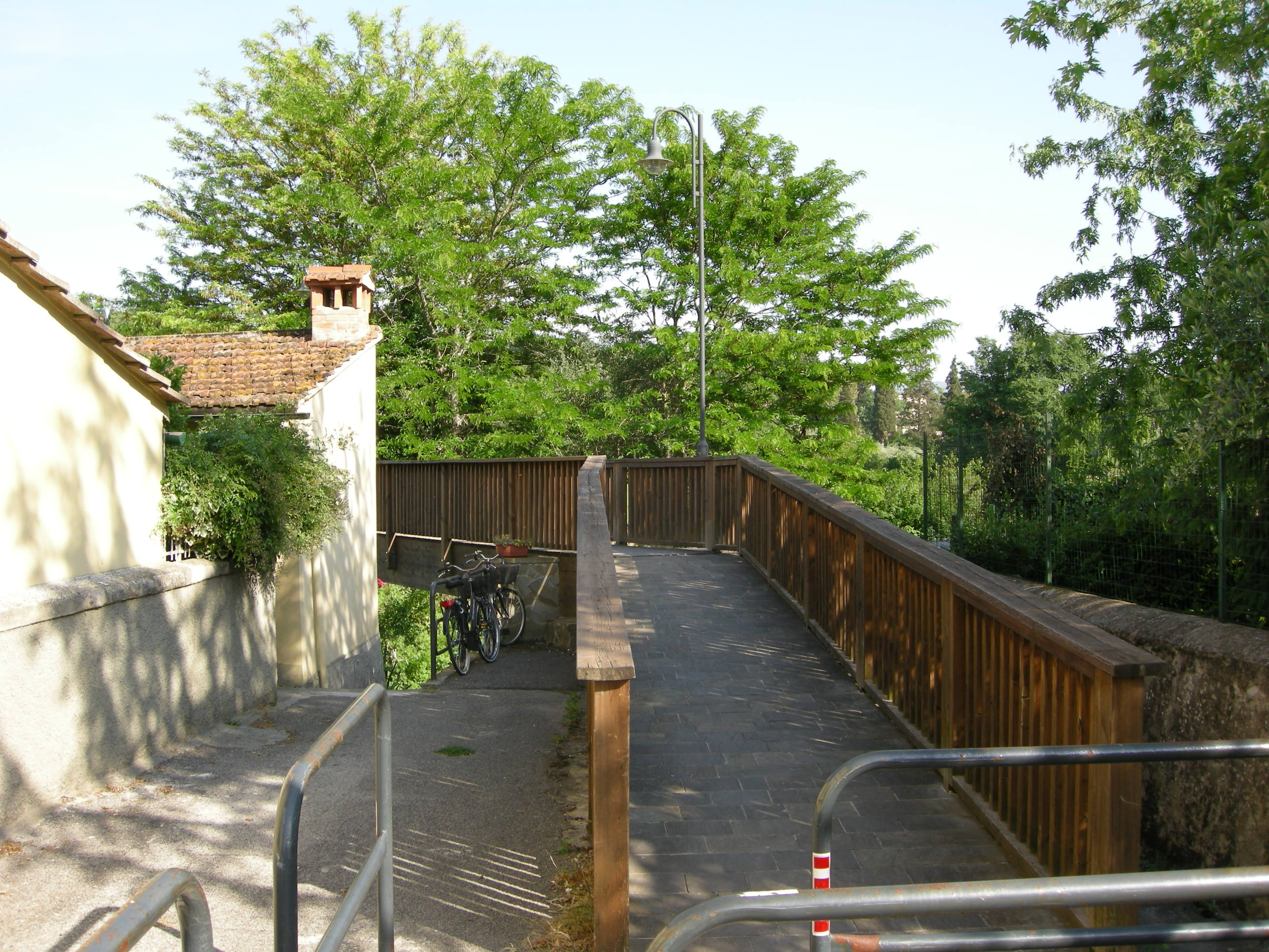 Via madonna delle grazie, firenze, ponte sulla mensola